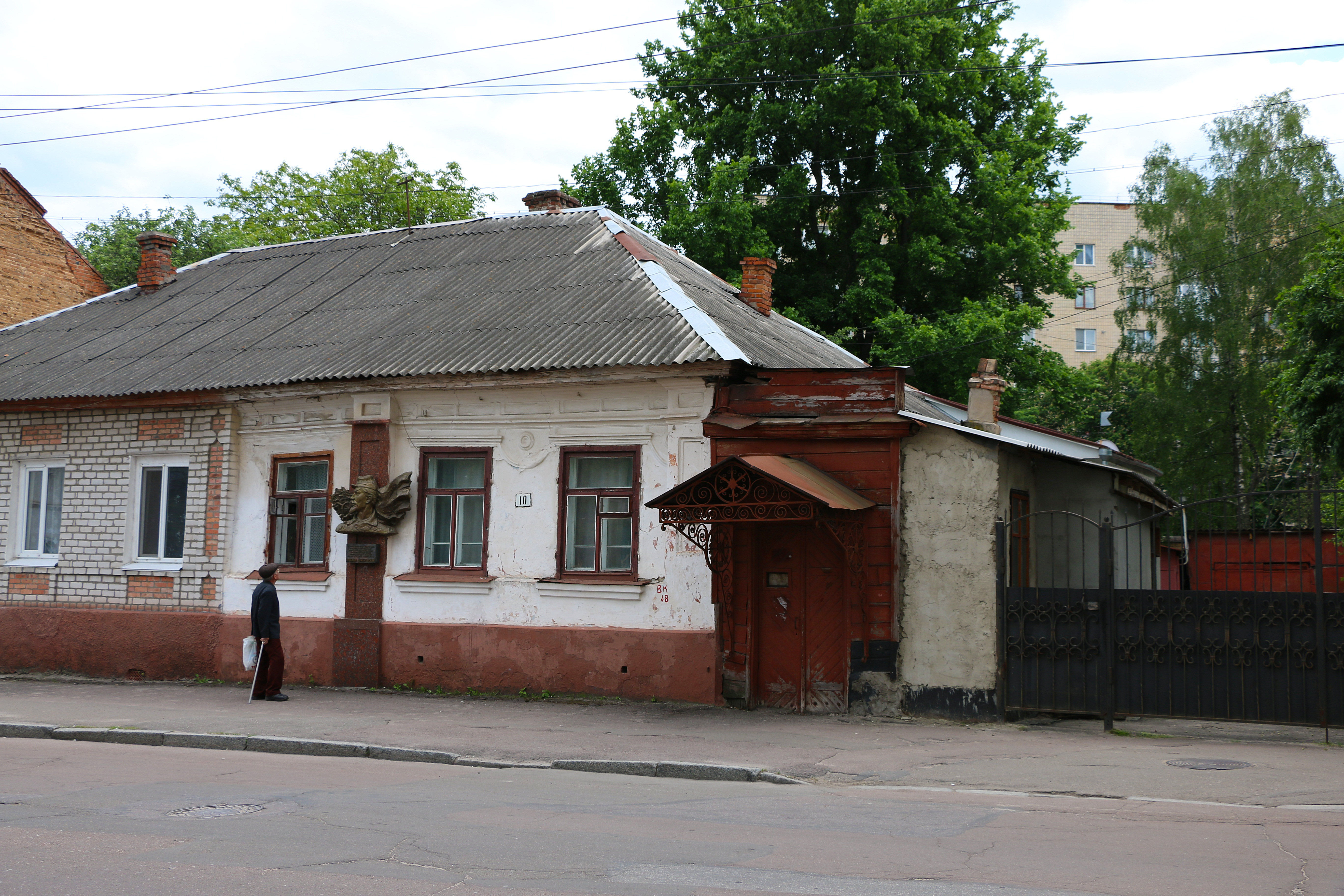 Будинок, в якому народився Ярослав Домбровський, генерал Паризької комуни, Житомир, вул. Мала Бердичівська, 10